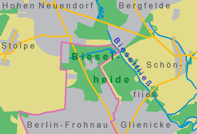 Kartenskizze der Bieselheide im Norden Berlins